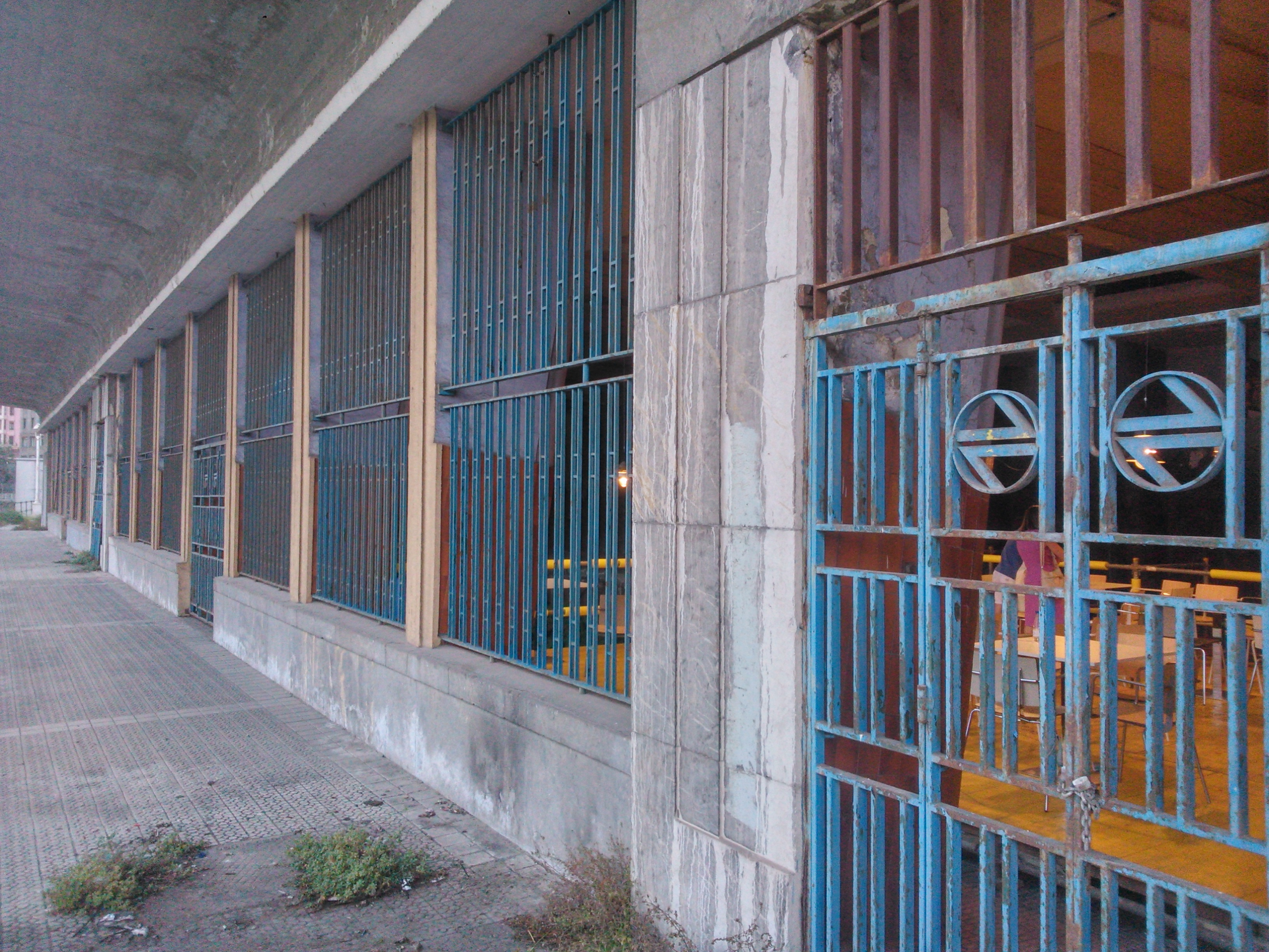 Renfeko Aldirien Bilbao-La Naja geltokirako sarrera